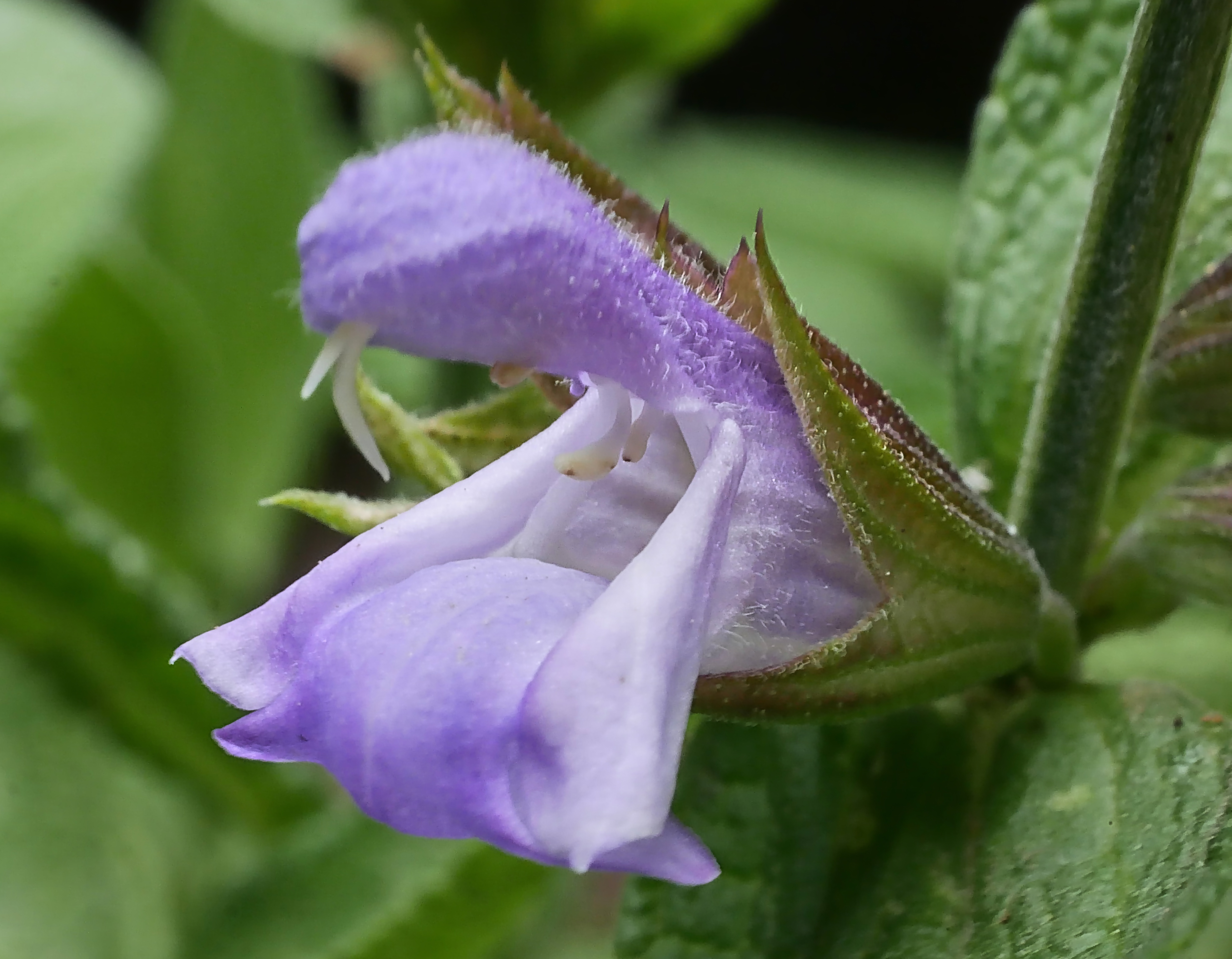 Die Echte Salbei (Salvia officinalis) im Freilichtmuseum Roscheider Hof. Standort: Kräutergarten